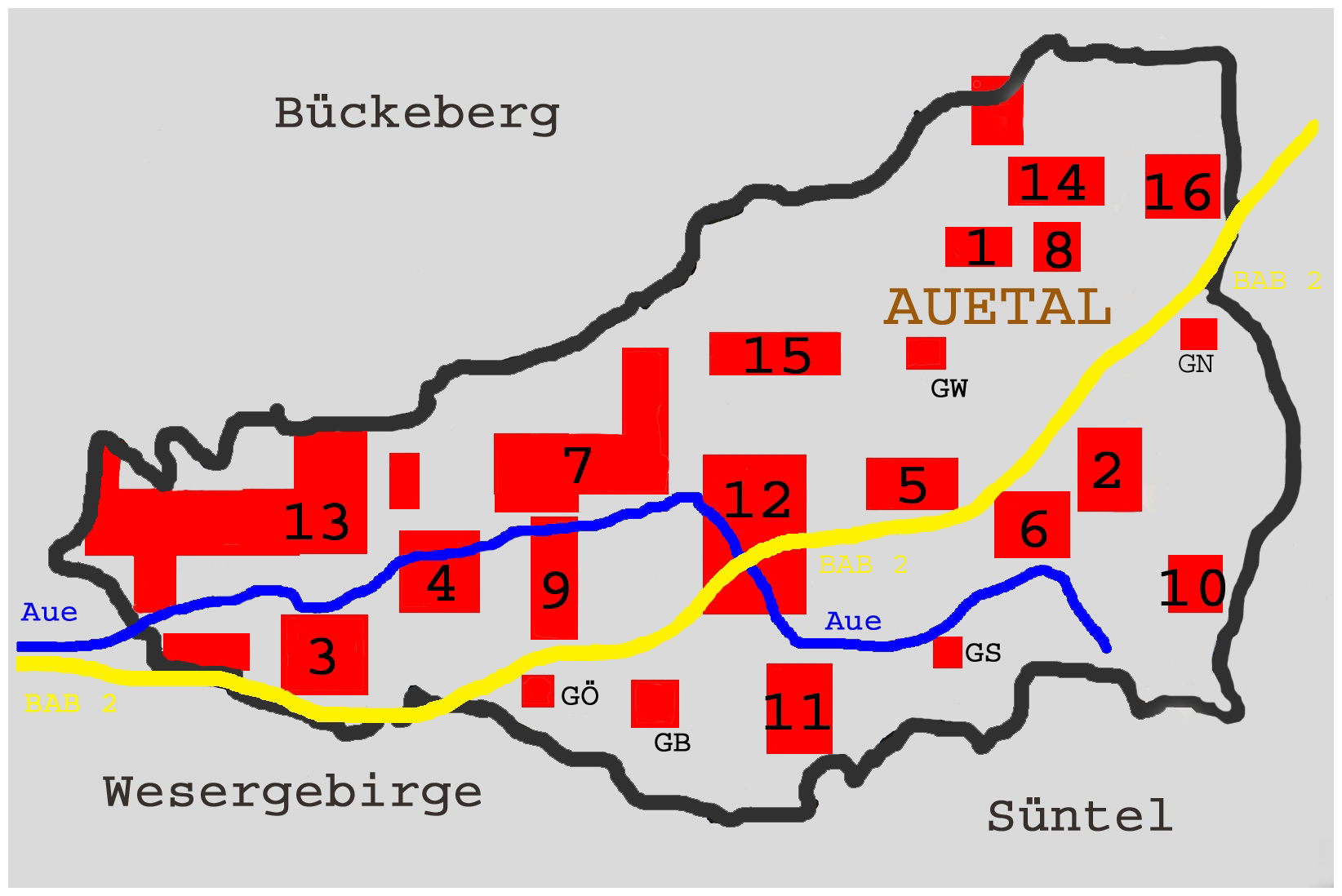 Gemeinde Auetal im Landkreis Schaumburg in Niedersachsen, 16 Ortsteile. Altenhagen 1 Antendorf 2 Bernsen 3 Borstel 4 Escher 5 Hattendorf 6 Kathrinhagen 7 Klein Holtensen 8 Poggenhagen 9 Raden 10 Rannenberg 11 Rehren 12 Rolfshagen 13 Schoholtensen 14 Westerwald 15 Wiersen 16 Gut Bodenengern GB Gut Nienfeld GN Gut Ölbergen GÖ Gut Südhagen GS Gut Wormsthal GW